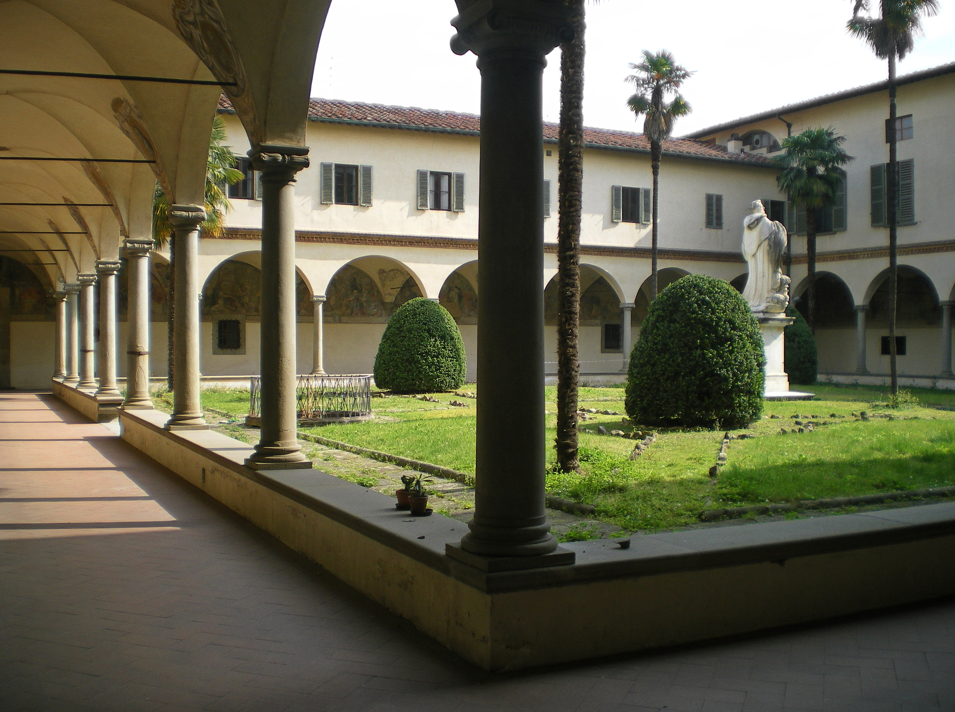 Chiostro di San Marco in Firenze